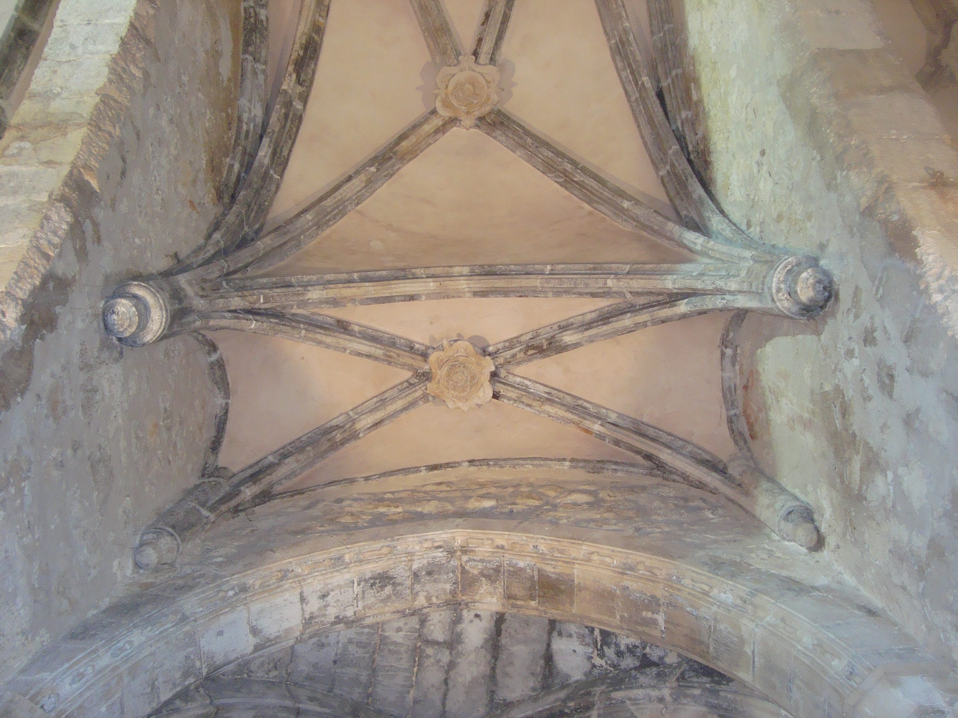 Església Vella dels Desamparats (les Coves de Vinromà) 05.050-003.